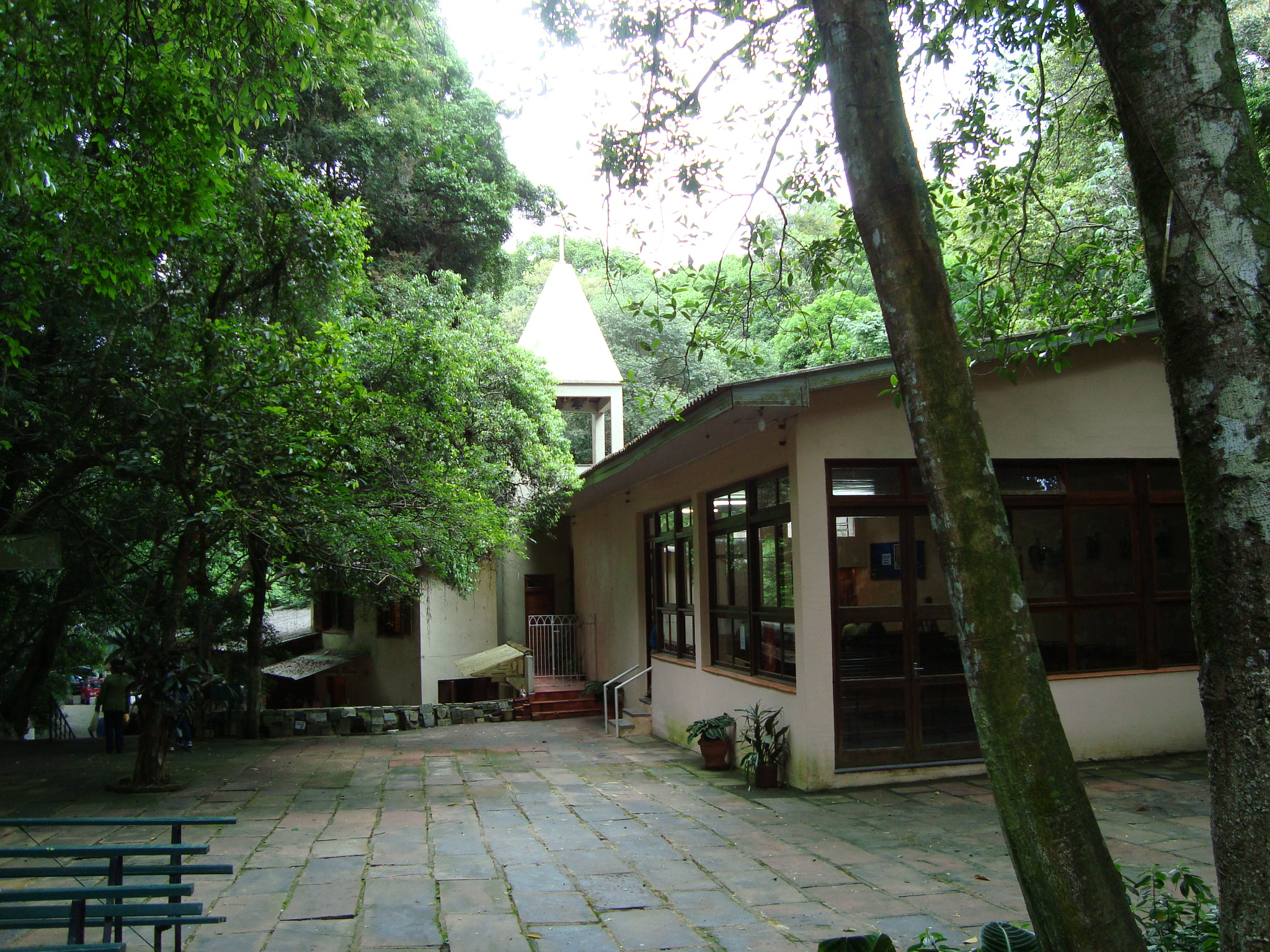 Capela da Gruta de Nossa Senhora de Lourdes em Porto Alegre, Rio Grande do Sul